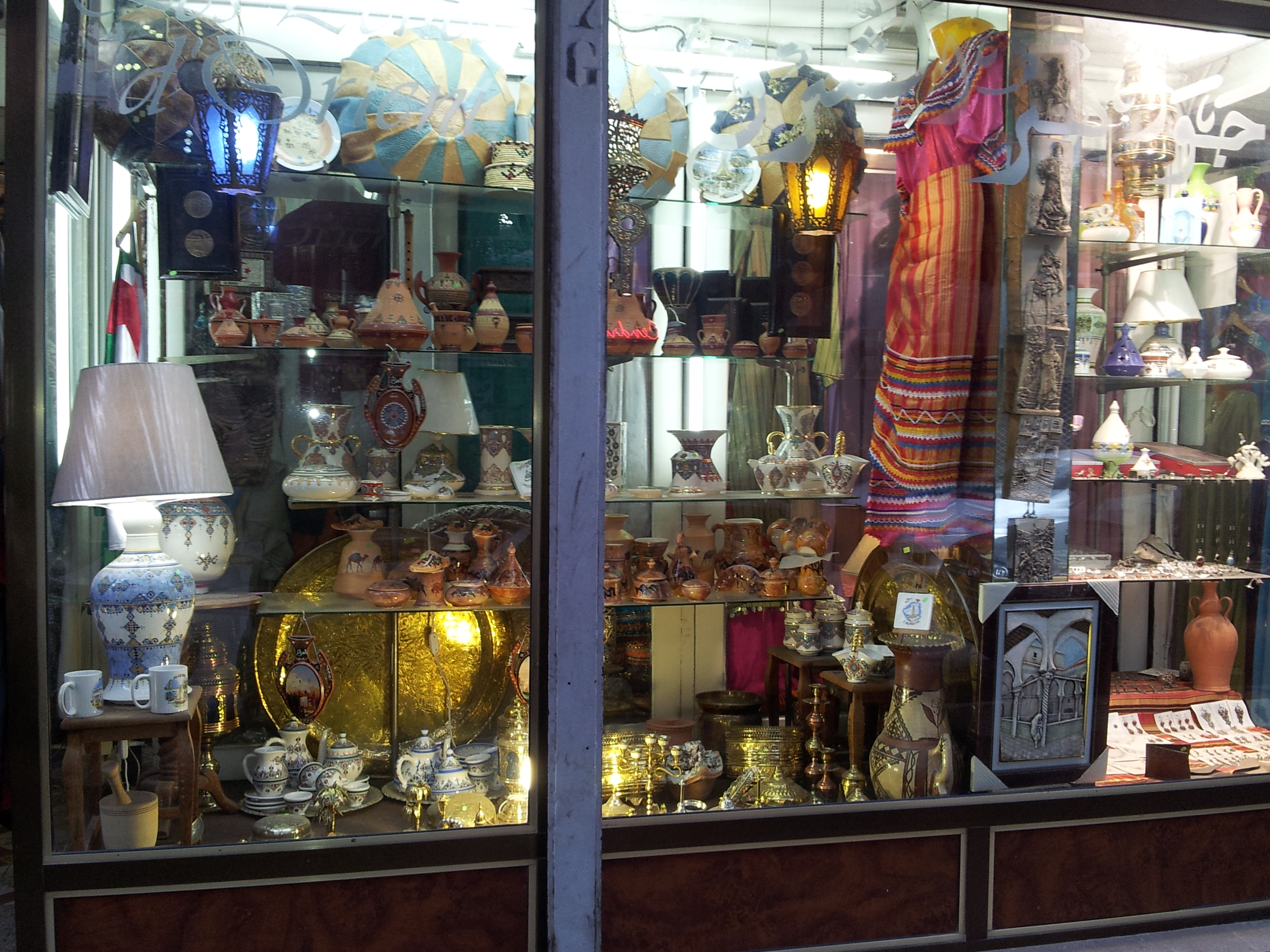 Artisanat algérien